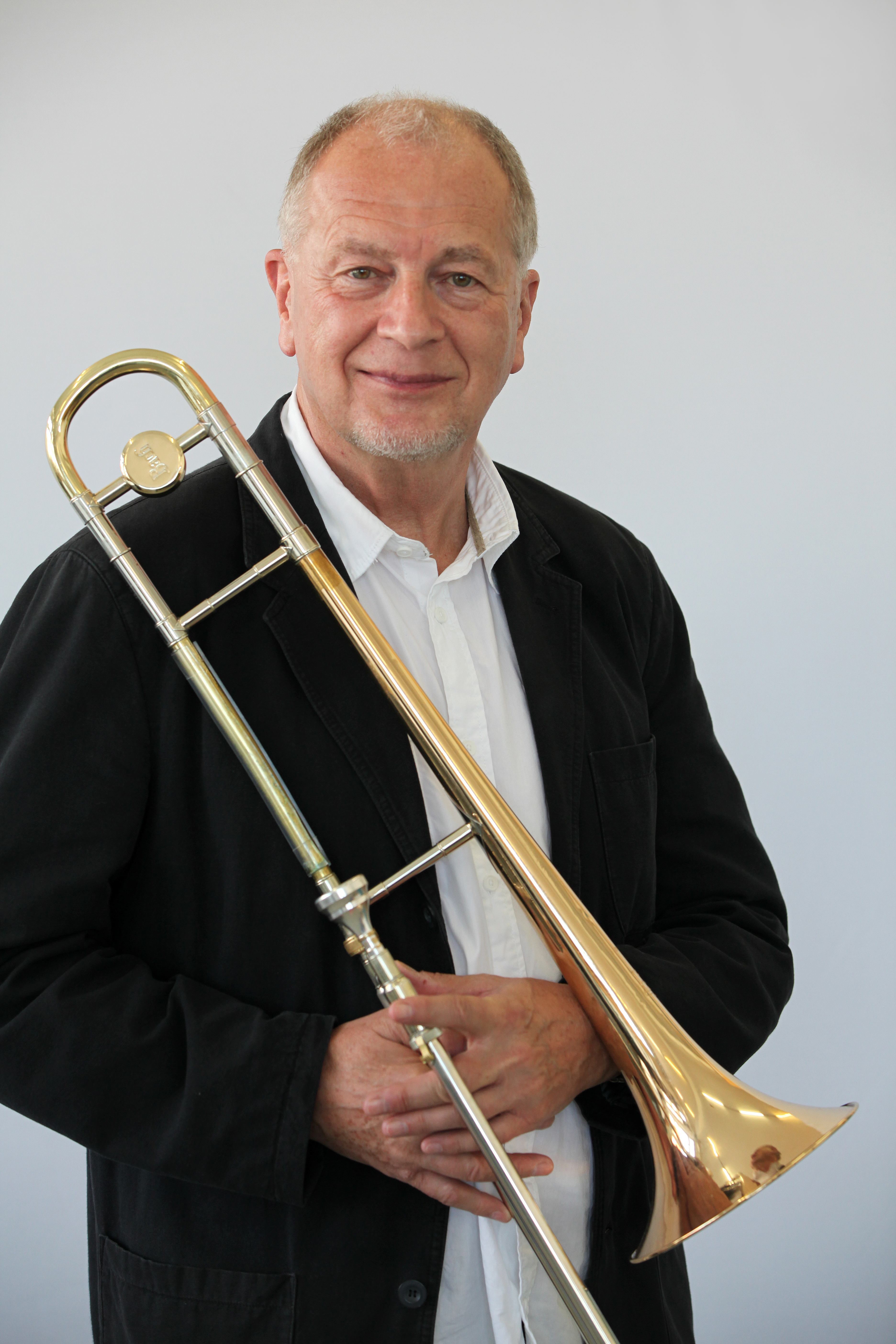 Charlie Schumacher -- Mr. Trombone